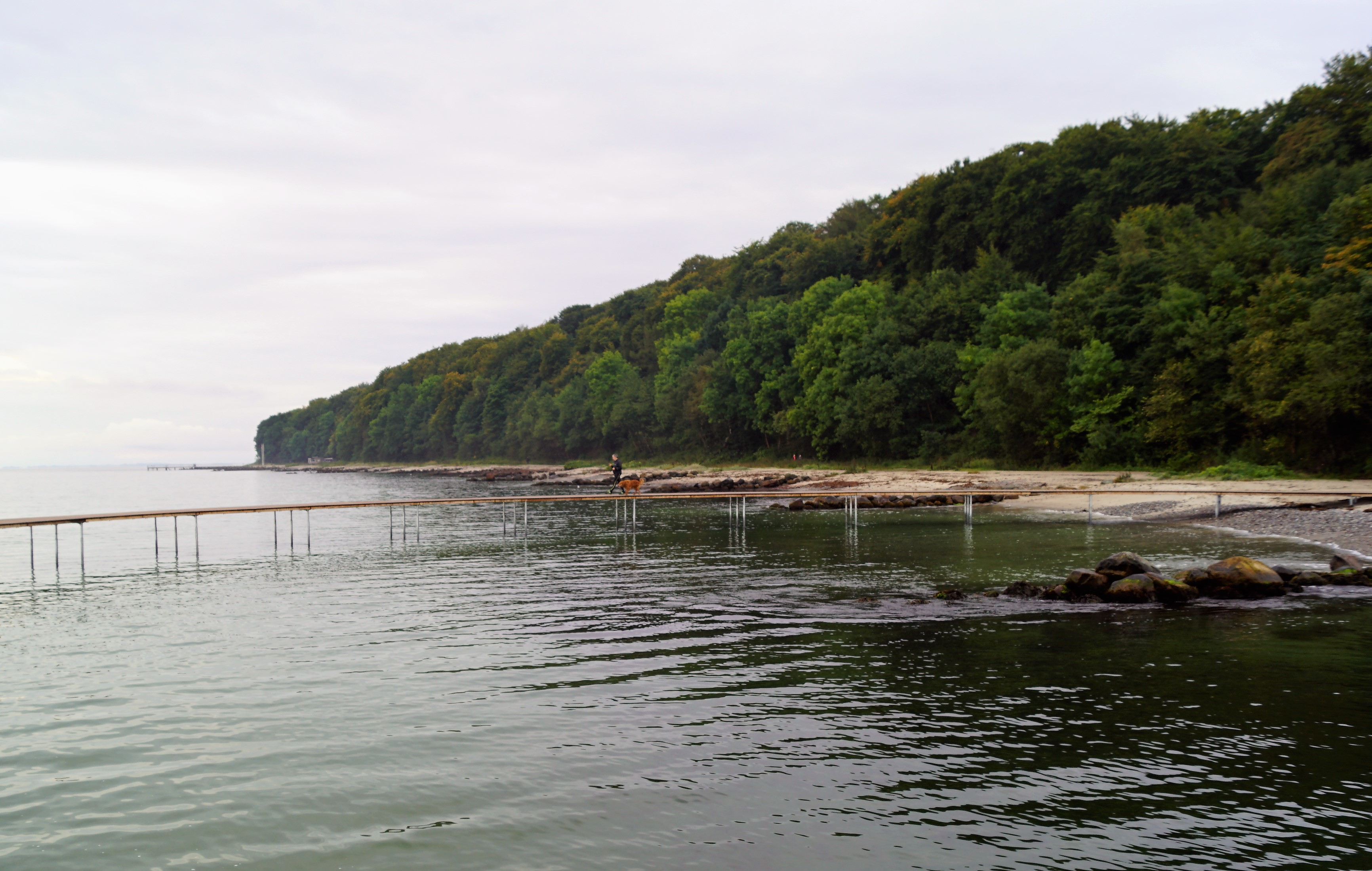 Ballehage syd for Aarhus i baggrunden, set fra den uendelige bro.